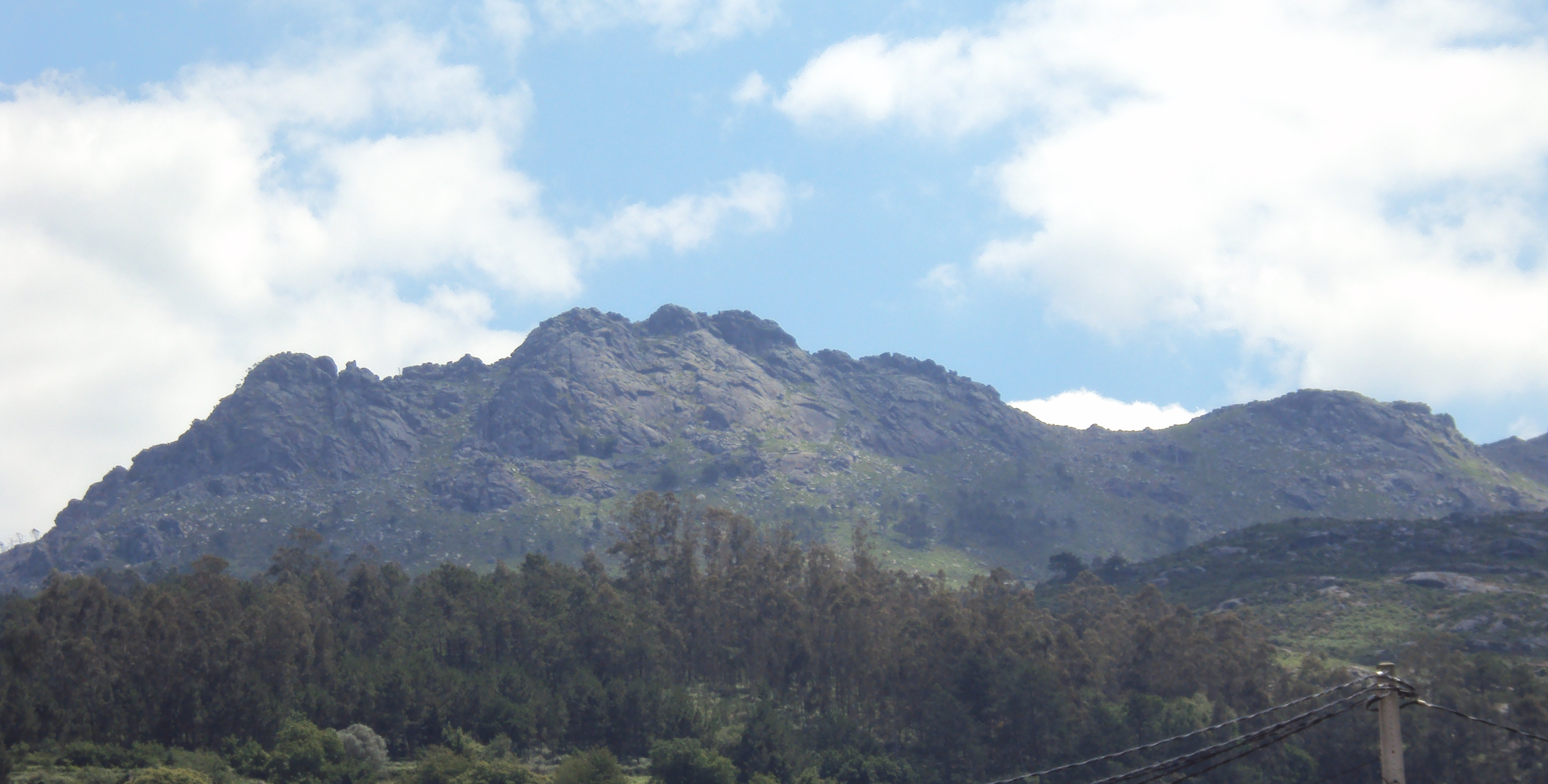 Monte Galiñeiro dende Vincios.